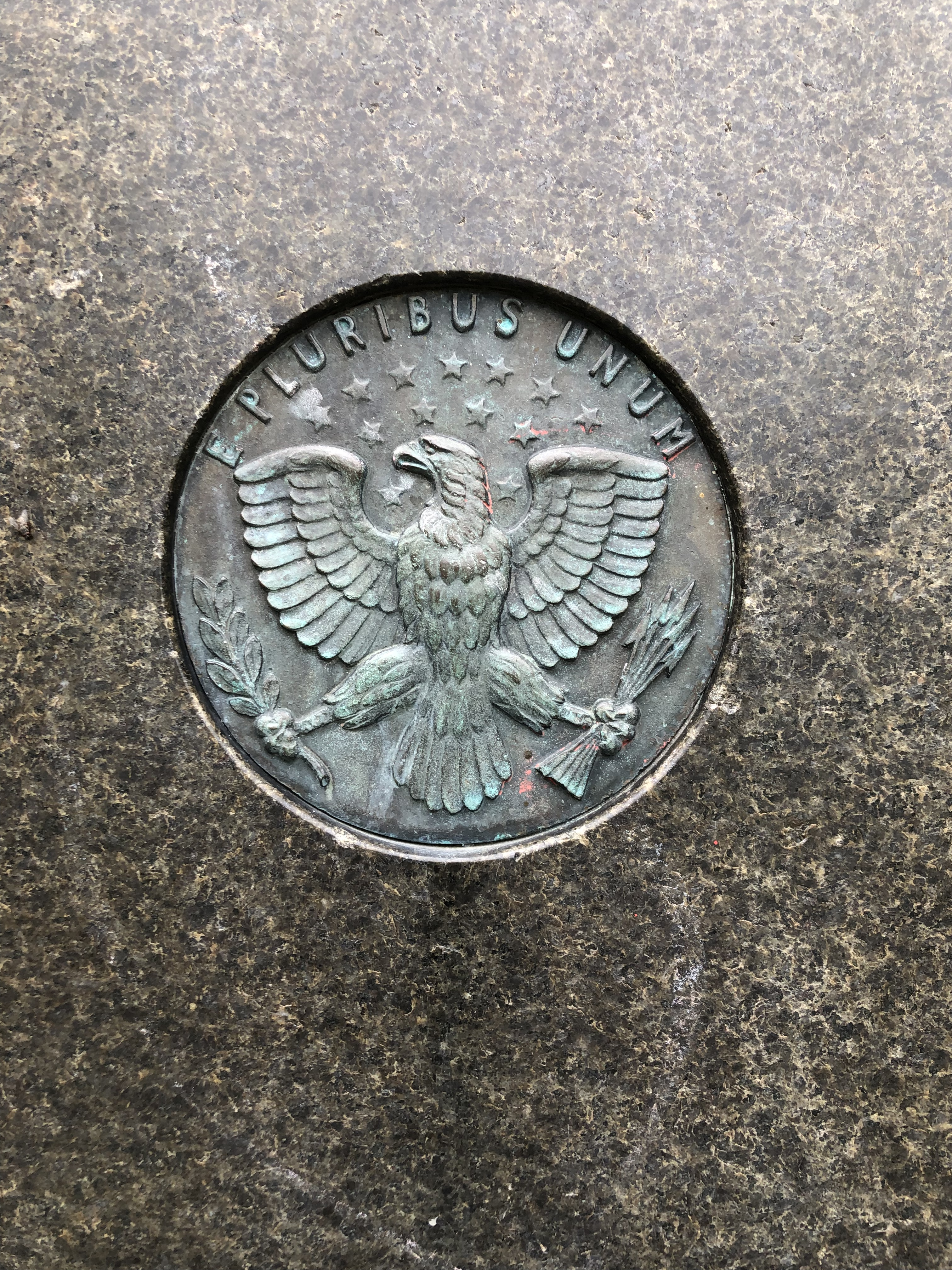 USA:s statsvapen på Gustav III:s staty i Näckrosdammen i Göteborg.